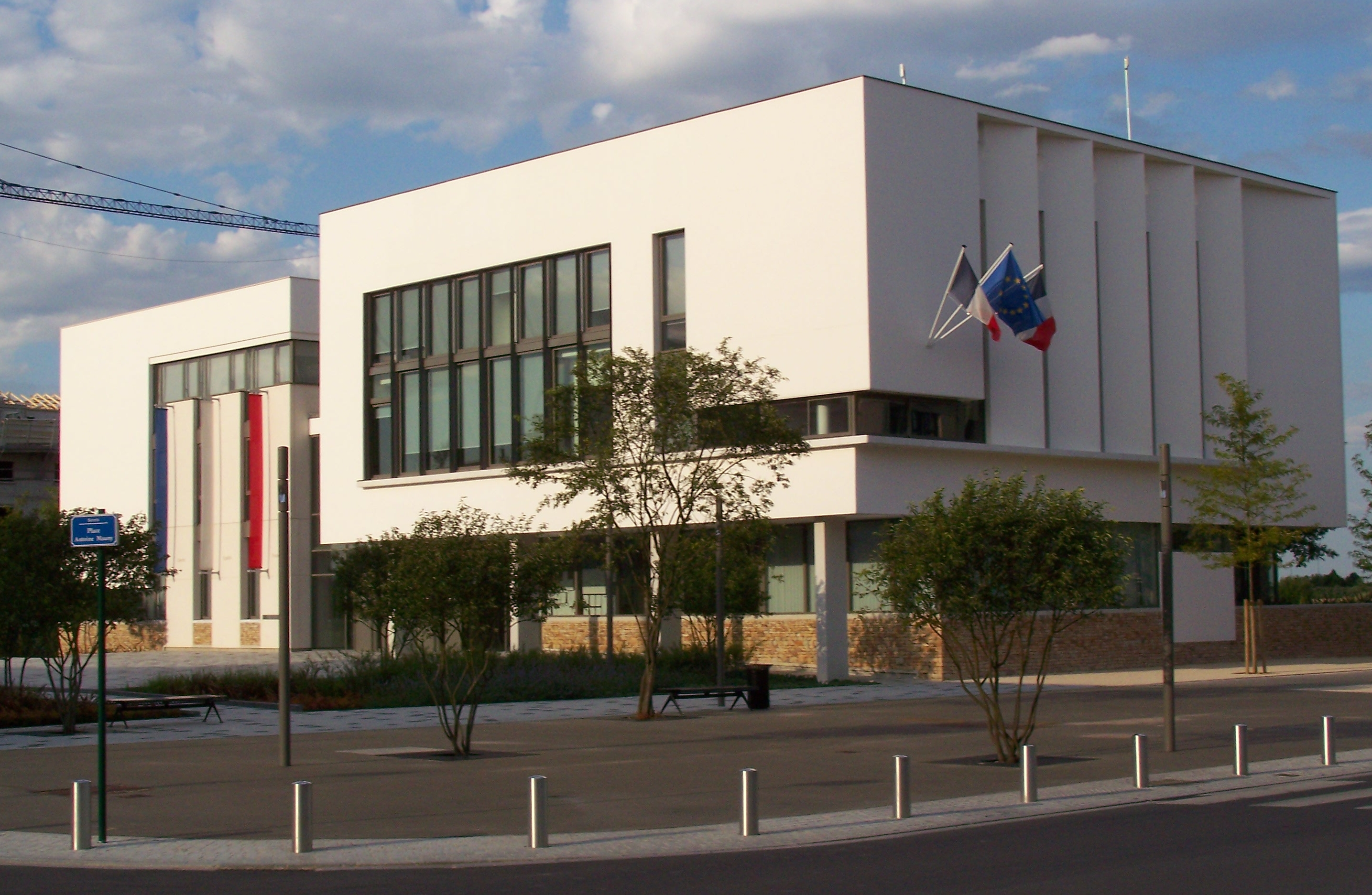 Serris France Hotel de Ville